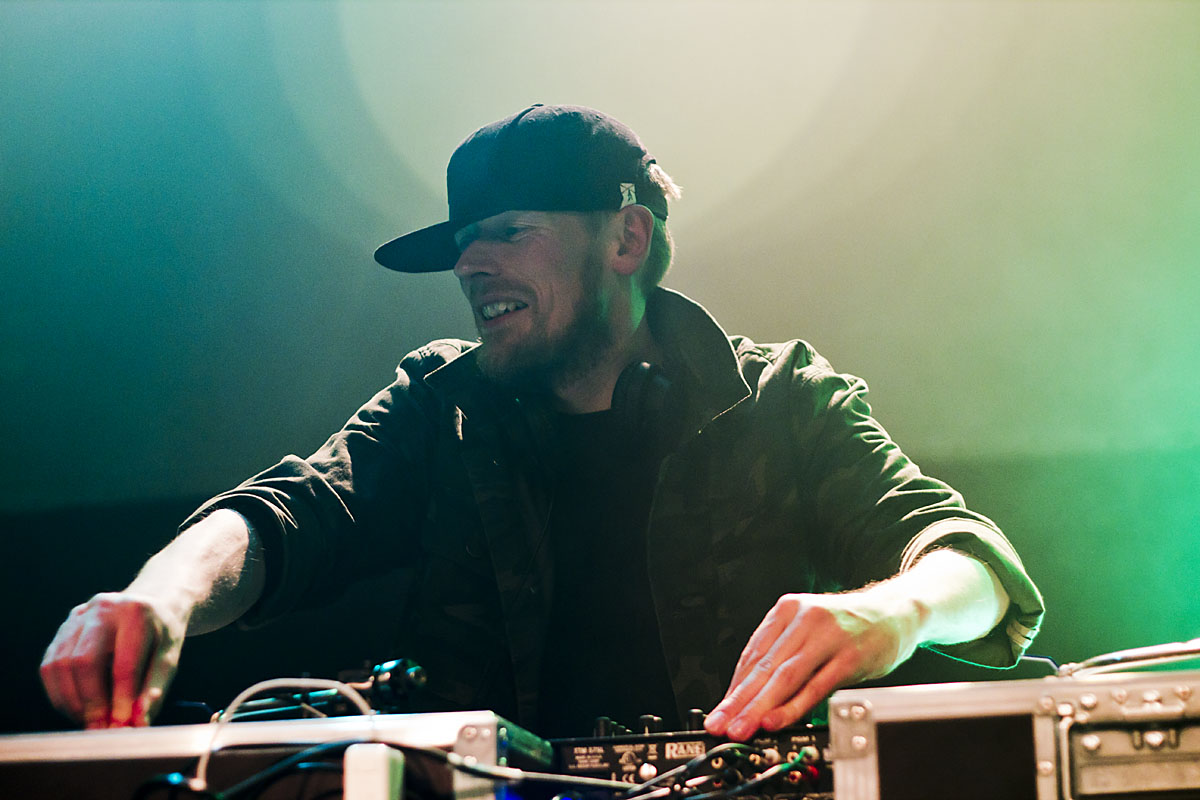 DJ Static på spillestedet Forbrændingen 9. februar 2013